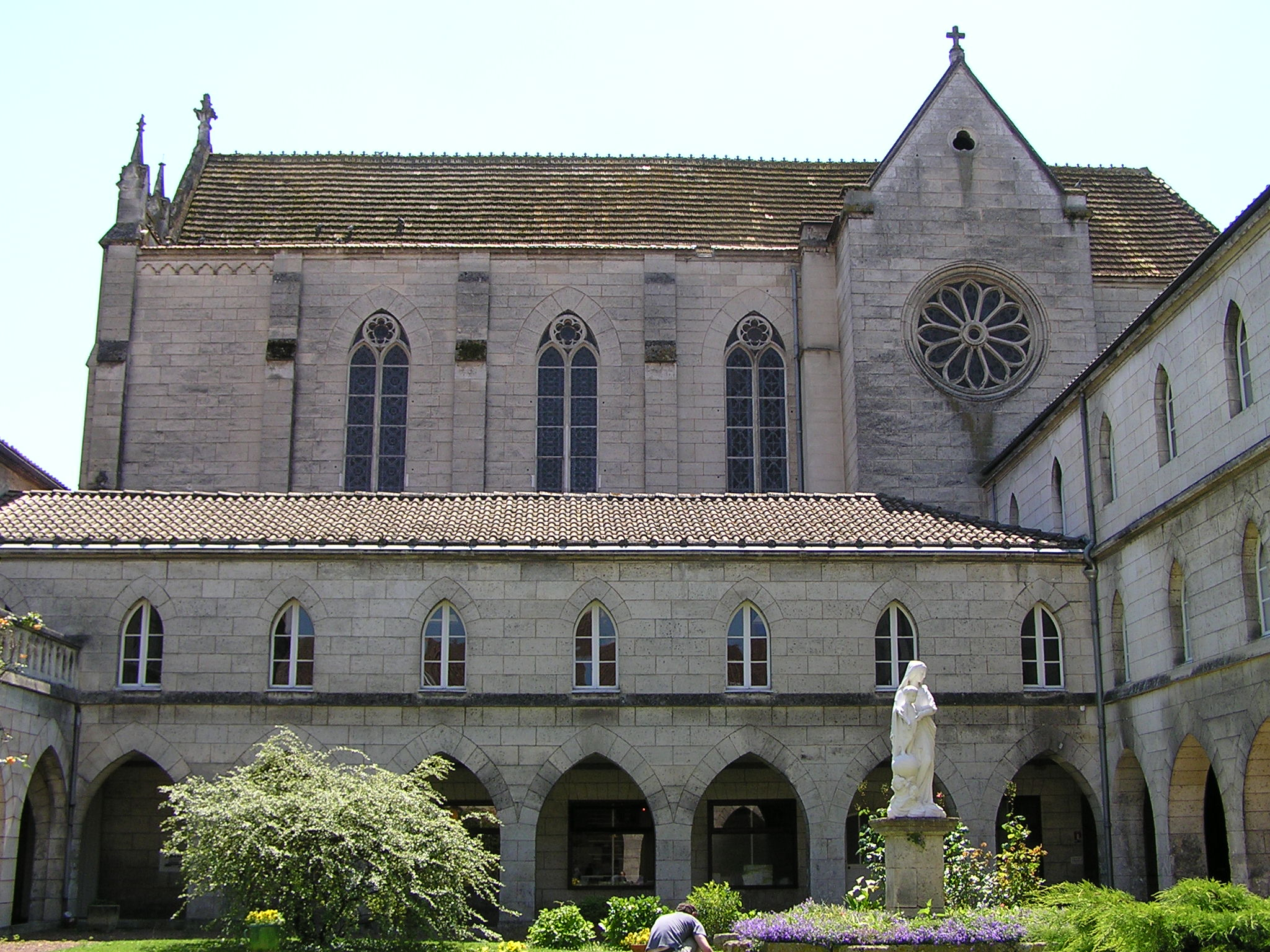 cloître de St-Ausone à Angoulême